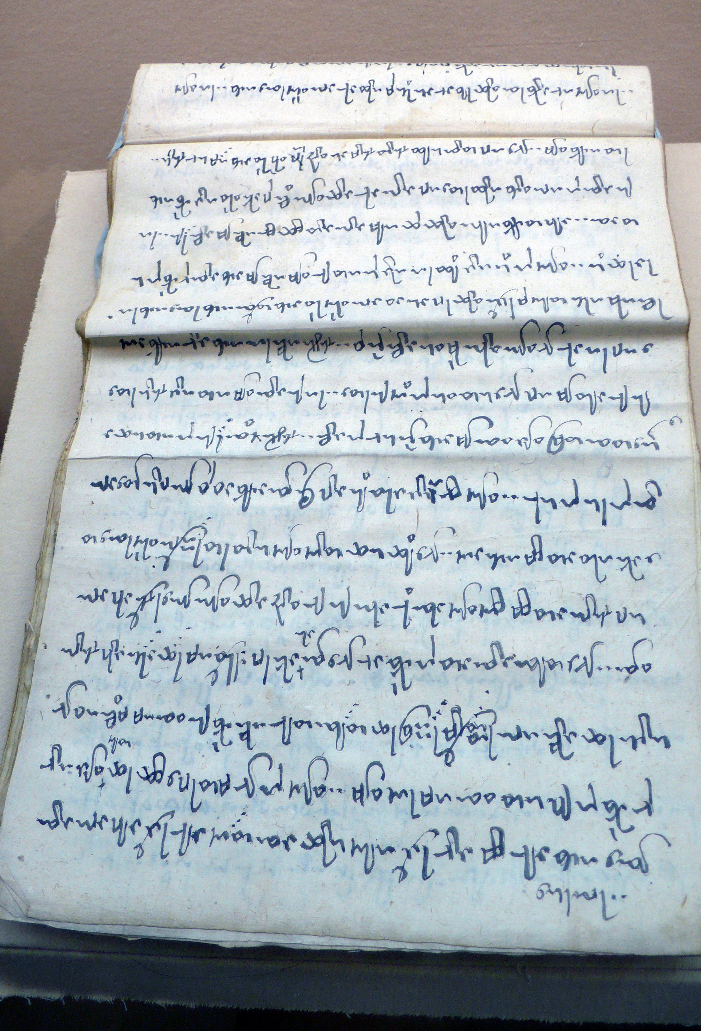 德宏傣文佛经。民大民族博物馆藏。